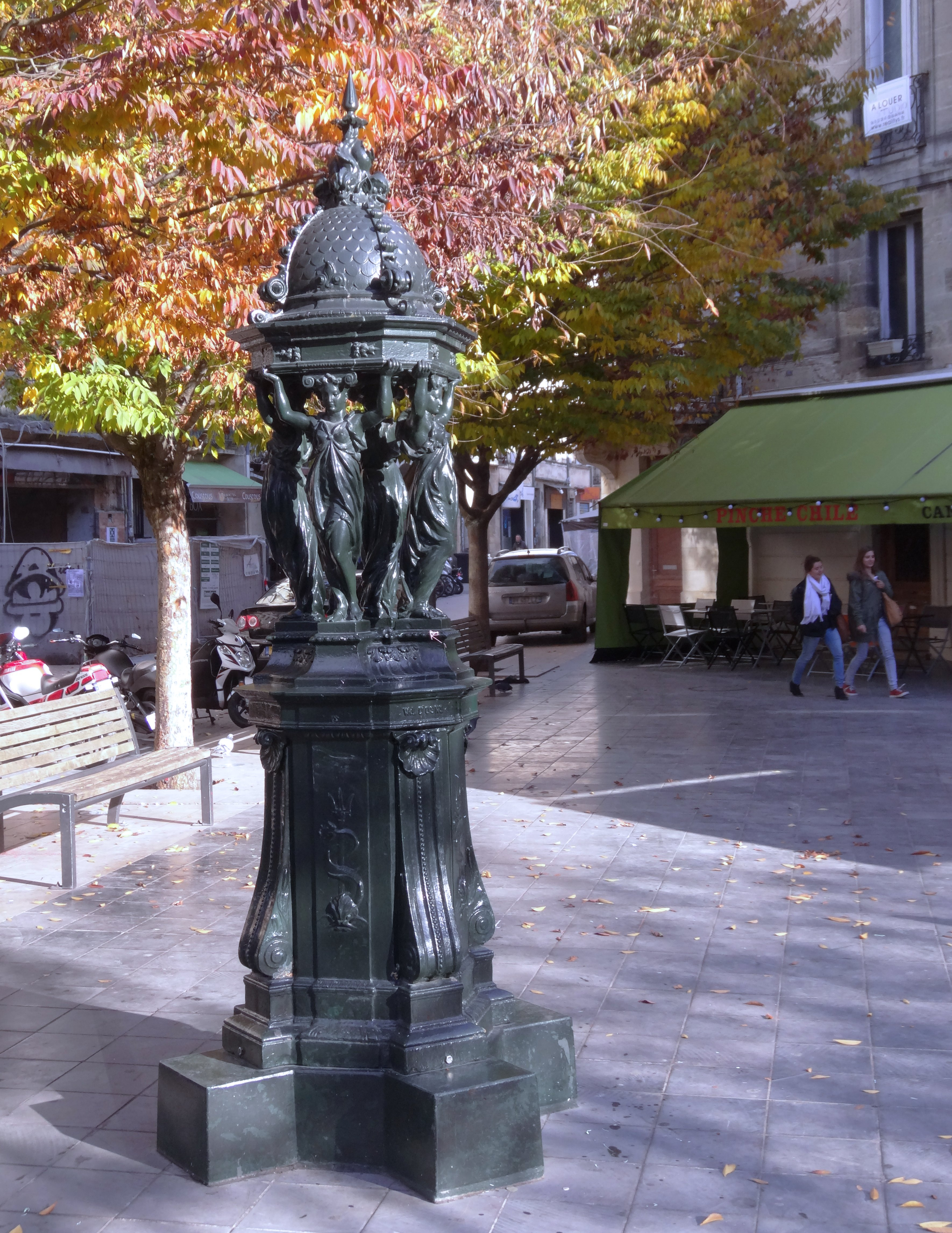 Fontaine Wallace place du général Sarrail à Bordeaux